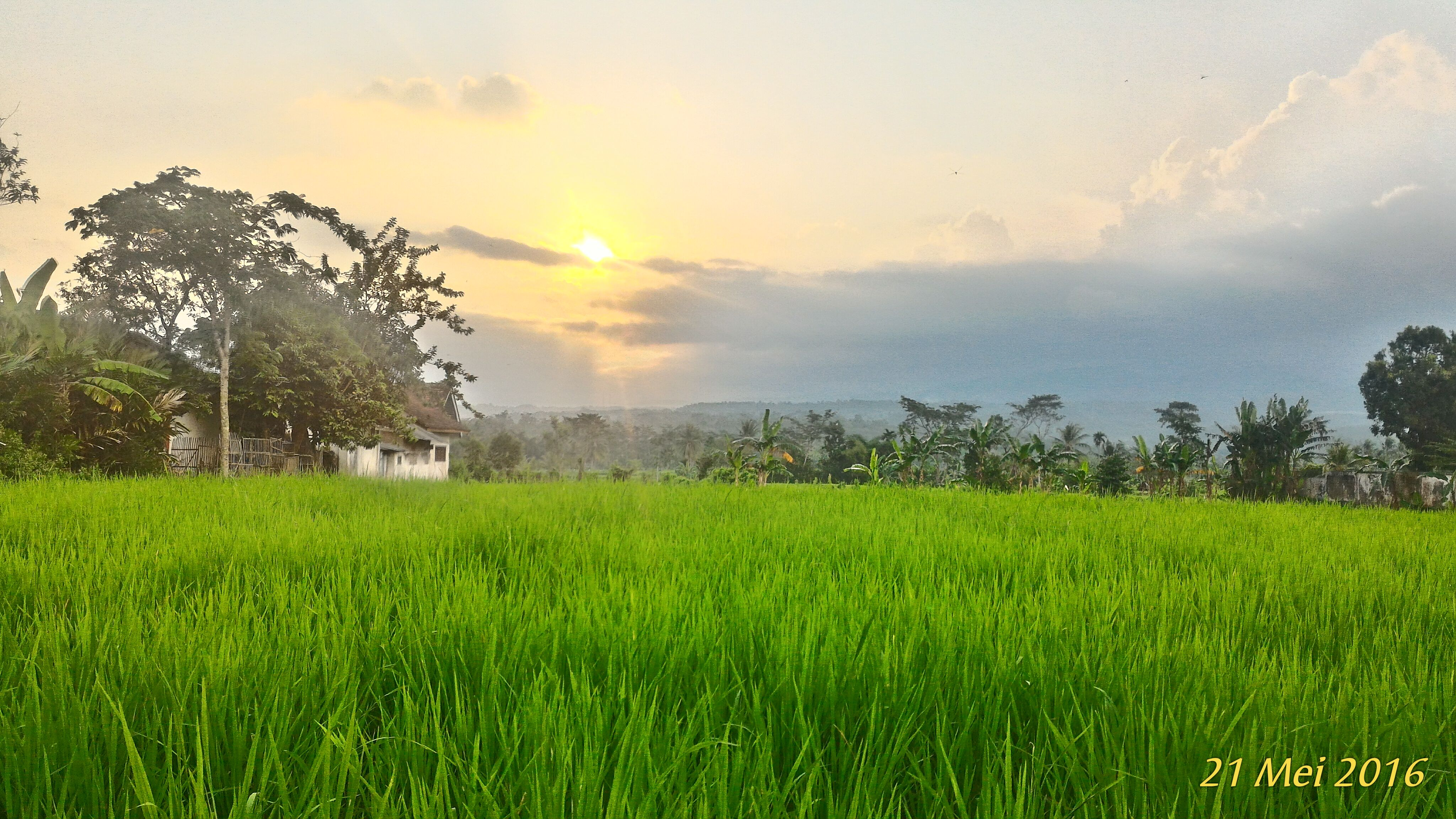 Indonesia merupakan salah satu negara agraris terbesar di dunia yang menjadikan ia juga sebagai lumbung padi dunia. Jember, merupakan daerah yang masih lestari akan budaya petaninya sehingga menyebabkan masih terdapat banyaknya sawah di daerah tersebut. Sawah tidak hanya menghasilkan padi, sawah juga menciptakan ekosistemnya sendiri yang menyebabkan banyaknya biota dan biodiversitas yang sangat beraneka ragam. Jember tidak hanya memiliki pematang sawah yang luas, Jember juga dikenal sebagai penghasil tembakau terbesar di dunia. Dataran tinggi seperti bukit dan gunung maupun dataran rendah seperti pantai melengkapi keindahan kekayaan daerah tersebut.